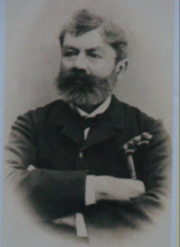 Foto de Máximo Villaflor